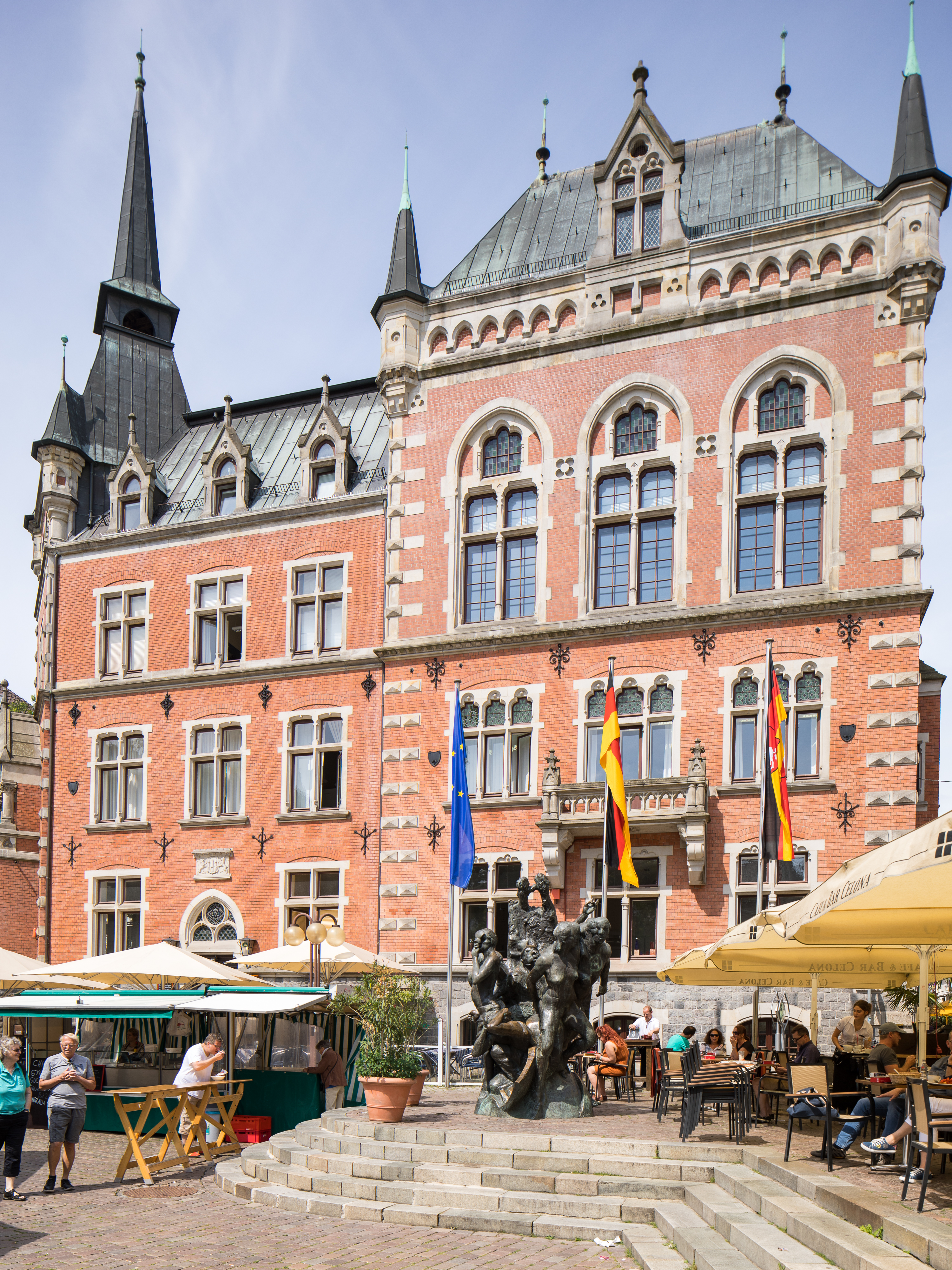 Neues Rathaus Oldenburg - Ostansicht. Erbaut 1886-88 nach Plänen des Architekturbüro Zaar und von Holst, Berlin.